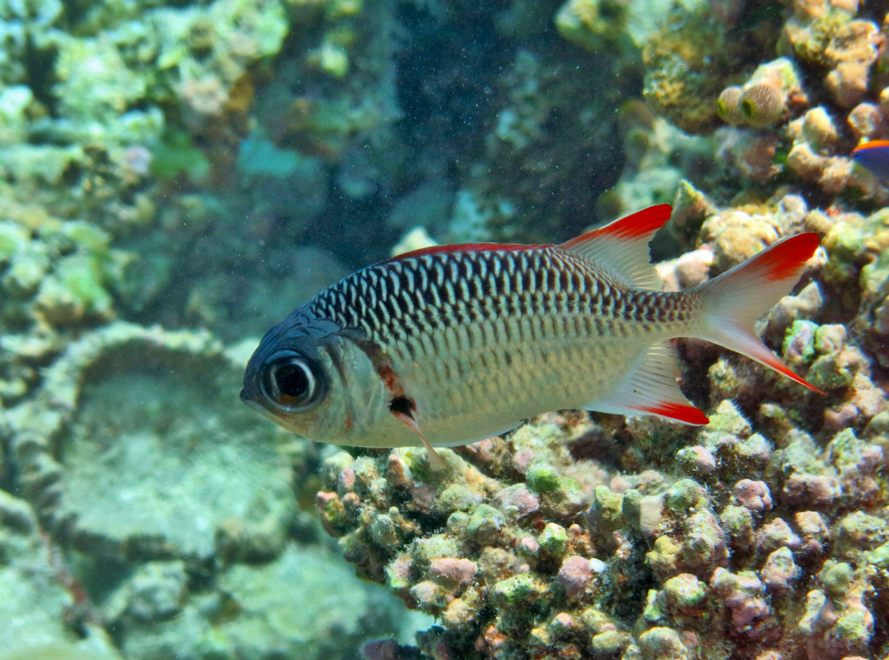 Un poisson-soldat violacé (Myripristis violacea) aux Maldives (atoll de Baa).